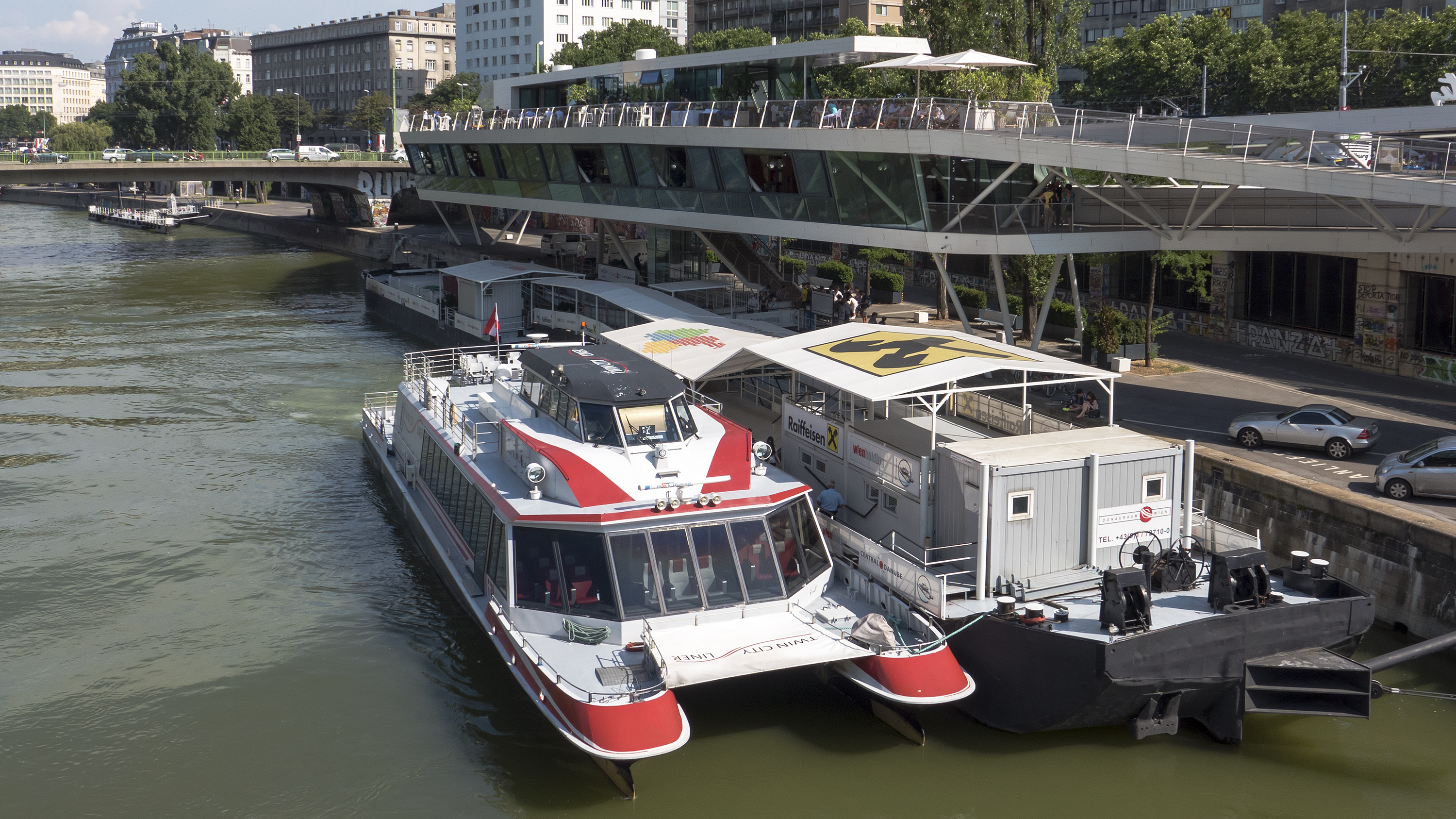 Donaukanal von der Marienbrücke Richtung Osten, Twin City Liner